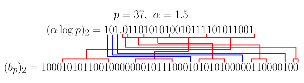 Схема построения элемента конструкции Ружа для множества Сидона с распределением A ( x ) = x 2 − 1 {\displaystyle A(x)=x^ \sqrt {2 -1 . Параметр α ∈ [ 1 ; 2 ] {\displaystyle \alpha \in [1;2]} полагается выбранным случайно. Позиции деления дробной части на блоки соответствуют квадратам целых чисел.